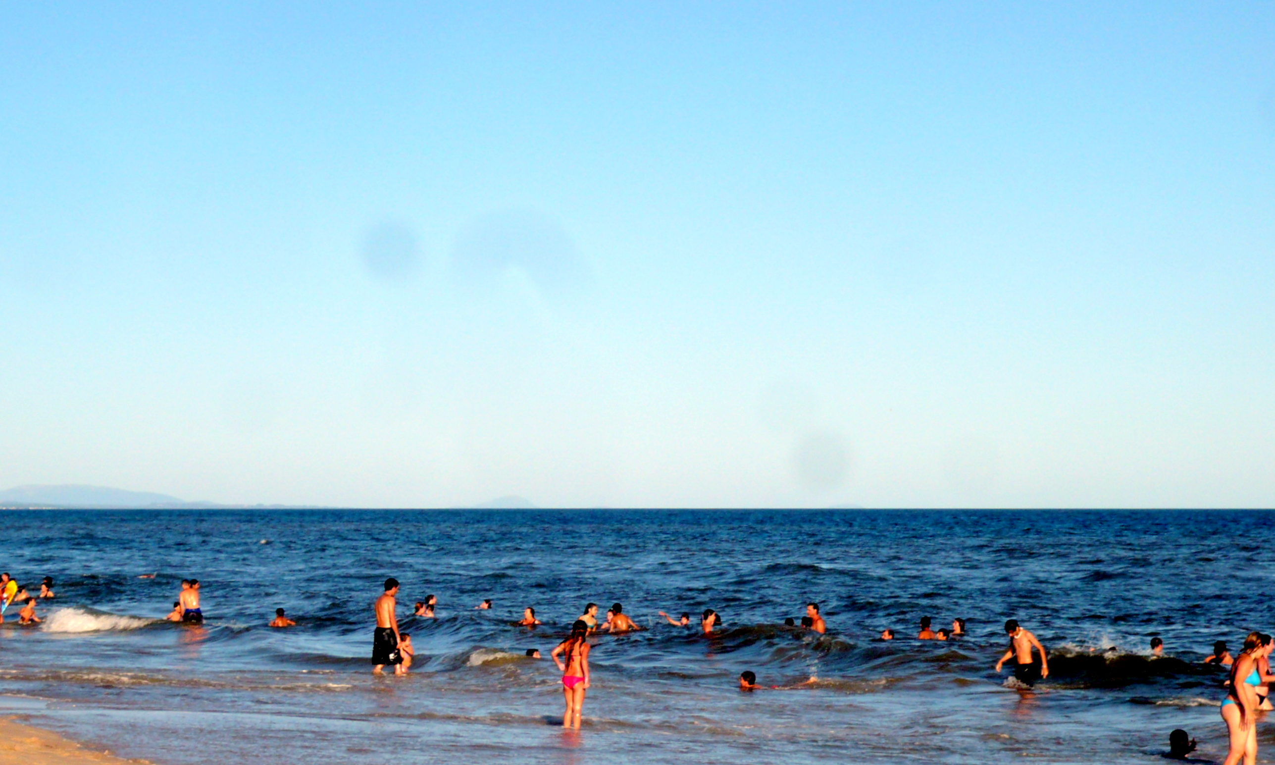 Playa de Pinamar Bajada por Av. Nogueira Canelones Uruguay